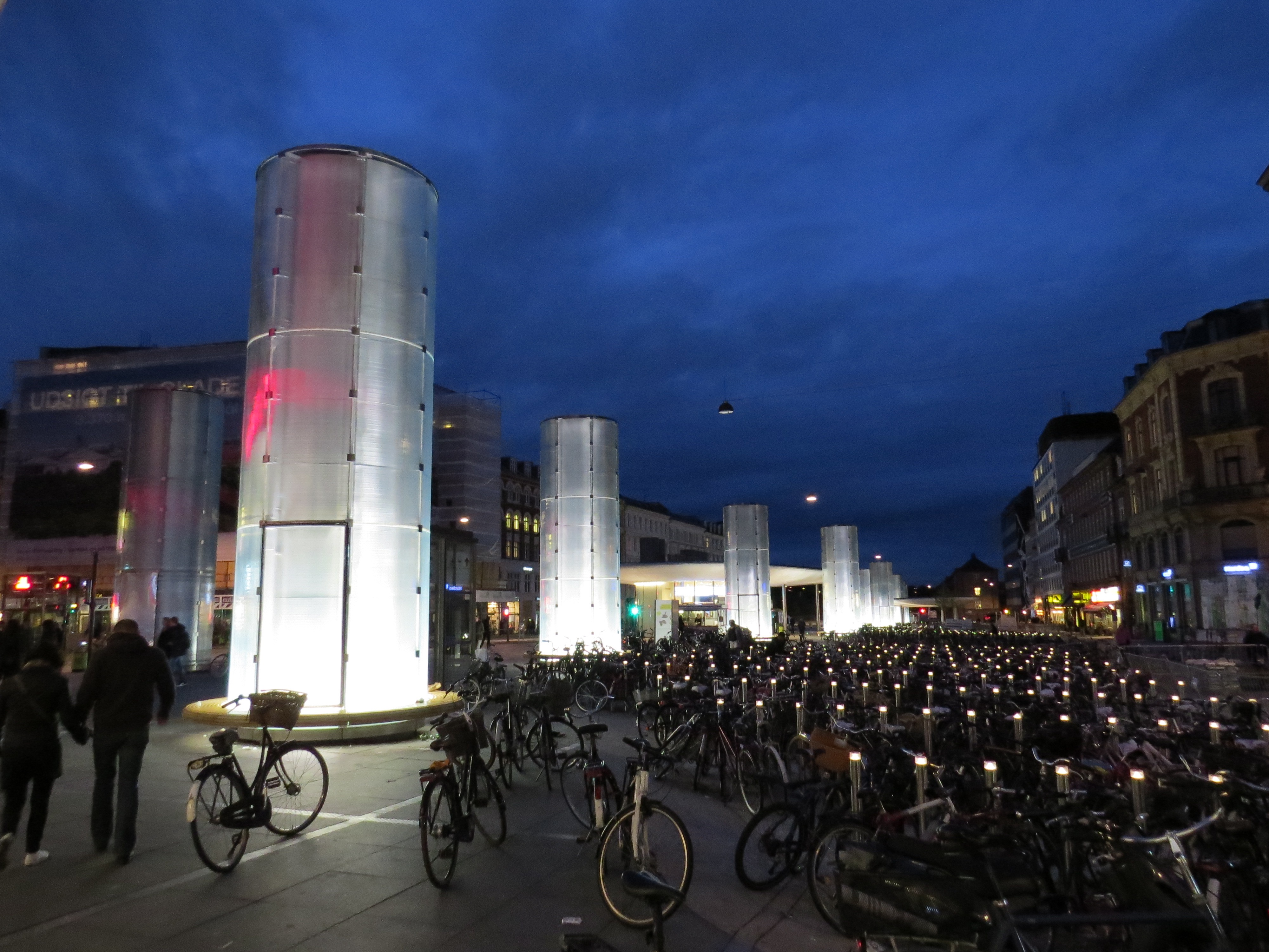 La Nørreport Station, Copenhague